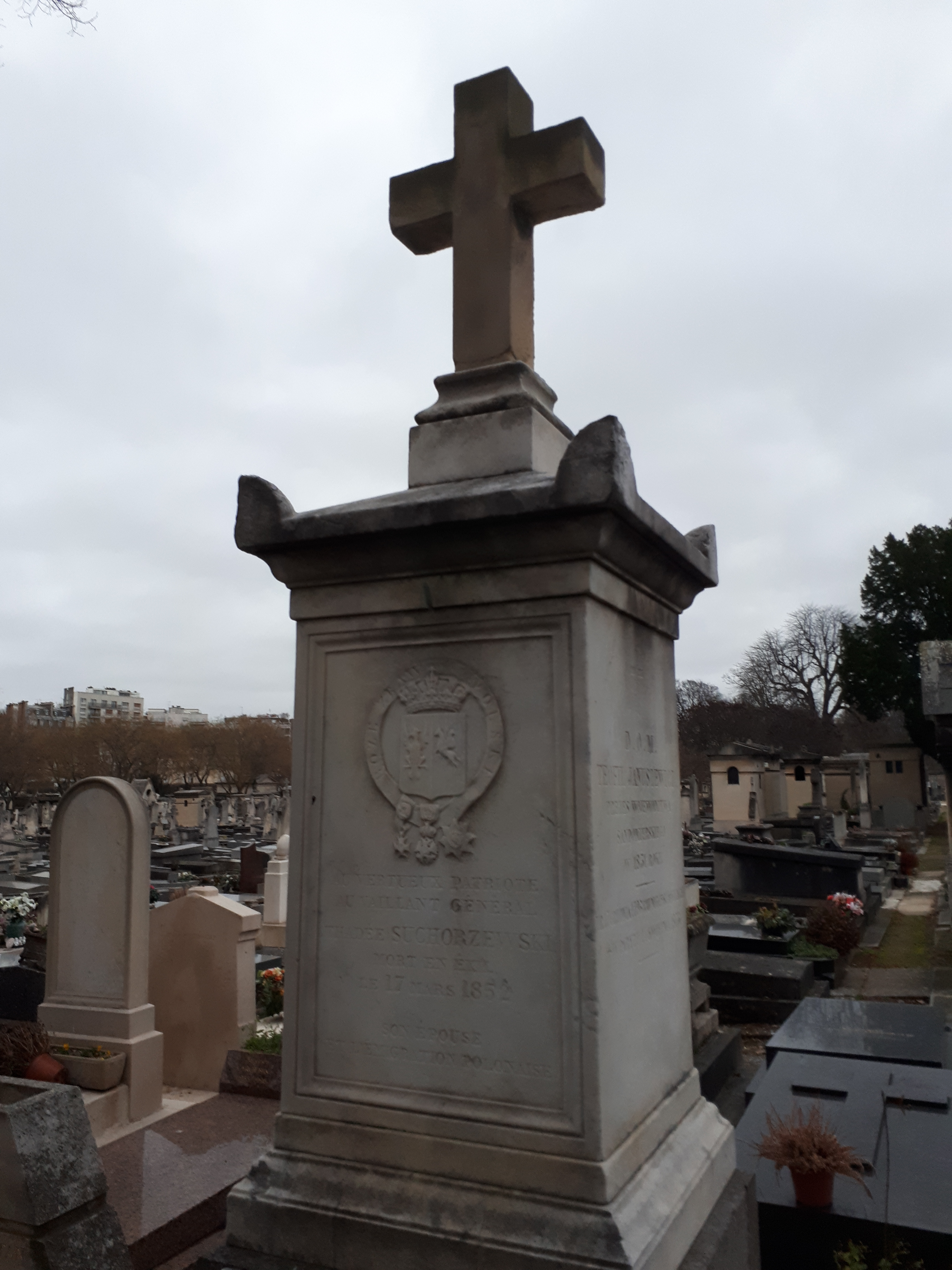 Cmentarz Montparnasse w Paryżu